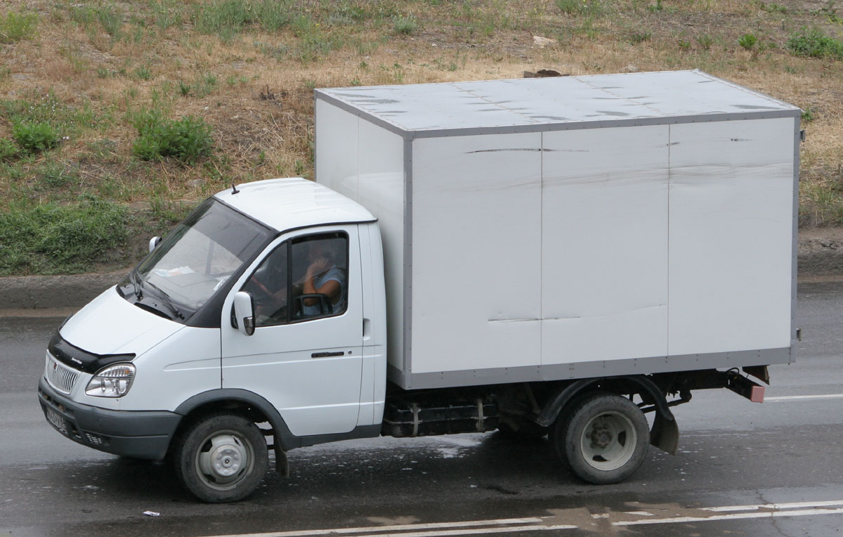 Фургон на базе автомобиля Газель в Саратове